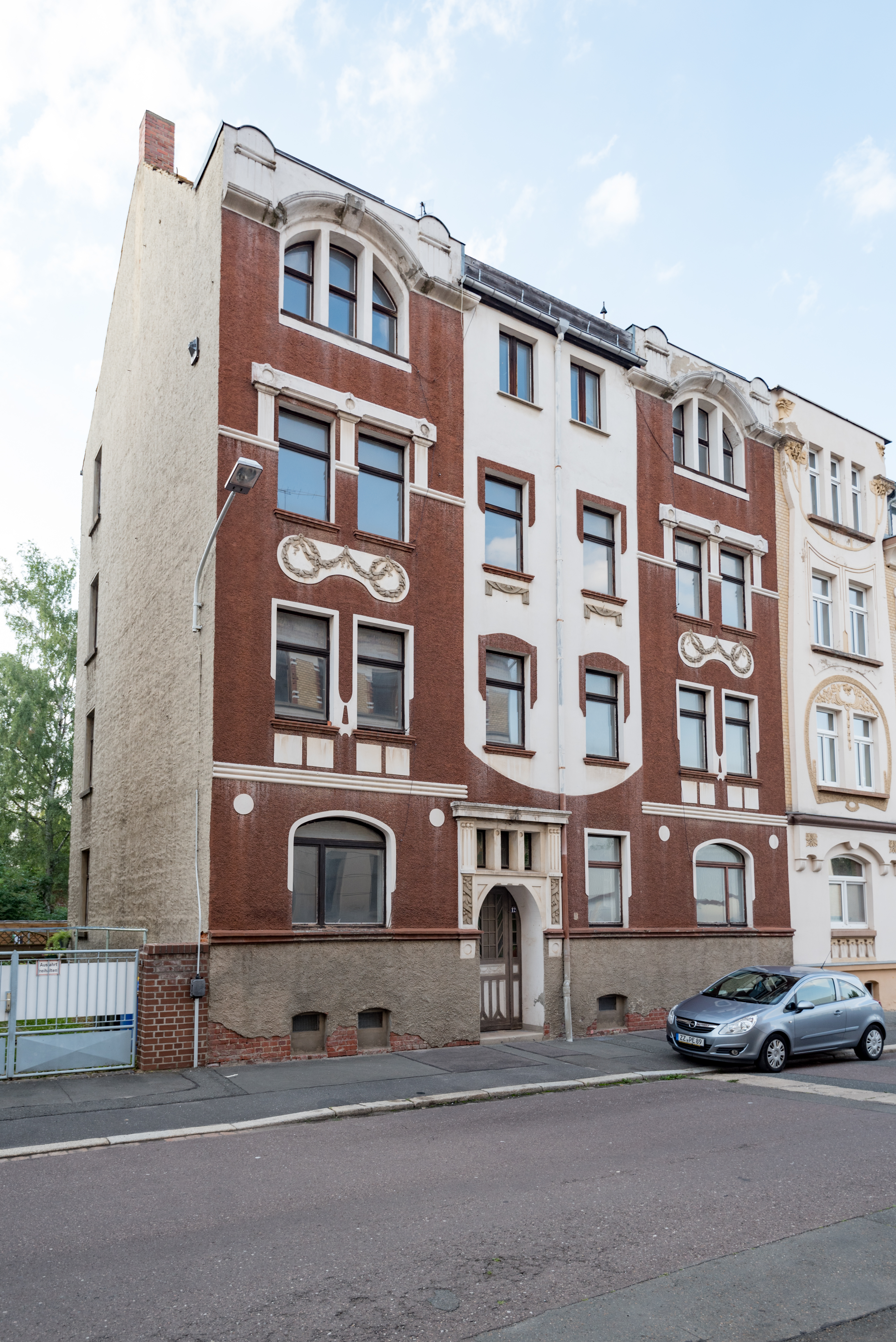 Zeitz, Fichtestraße 12